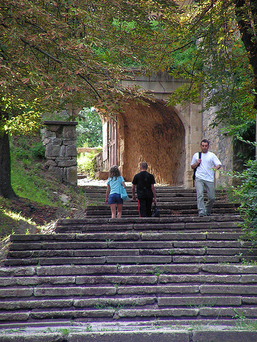 A kolozsvári fellgvári erőd megmaradt kapuja, Pasztilla jóvoltából és engedélyével.